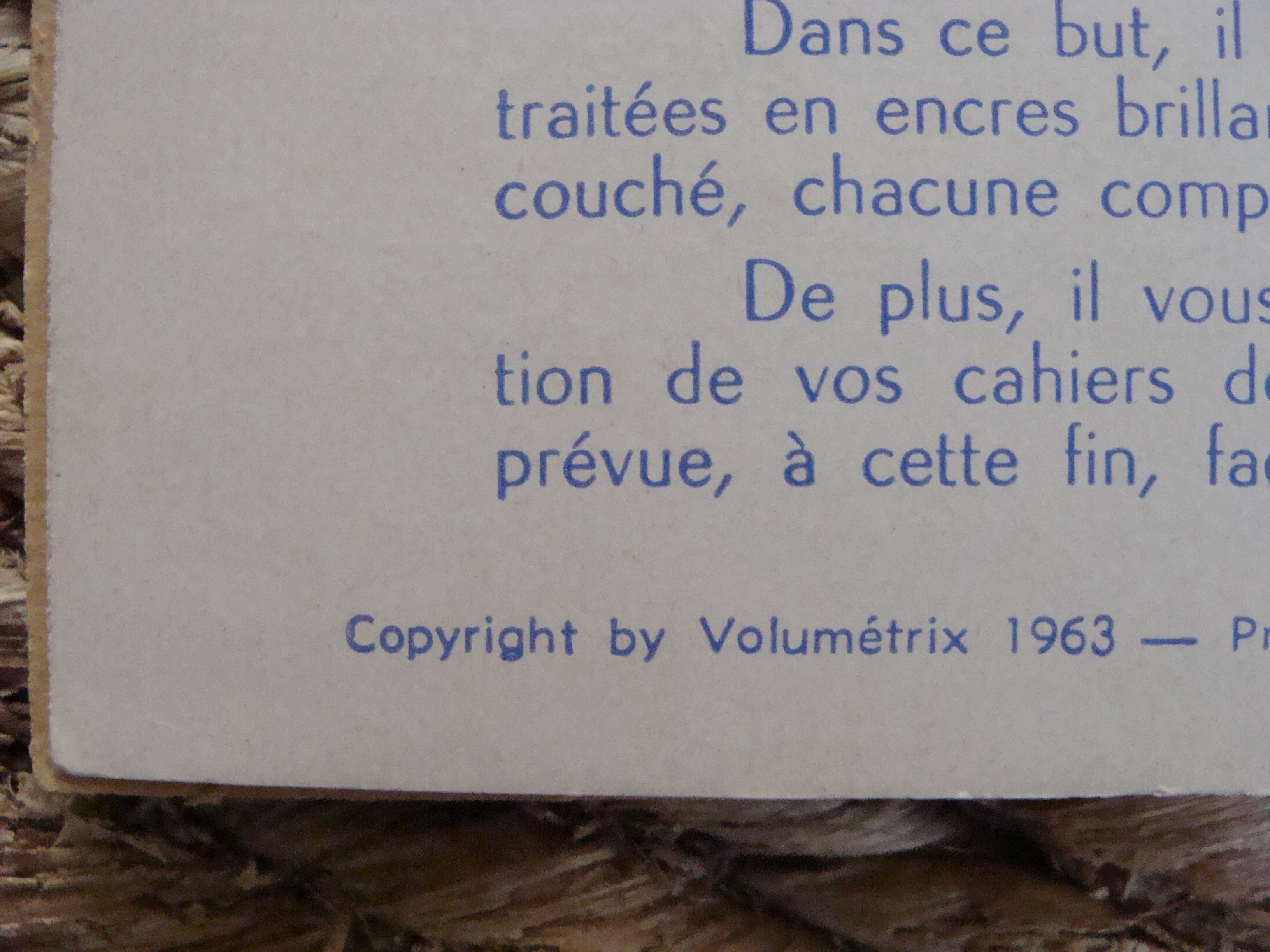 Il s'agit ici de démontrer les années de parution des livrets. Ici la deuxième édition des livrets Volumétrix de 12 pages éditées à partir de 1963 et jusque 1975